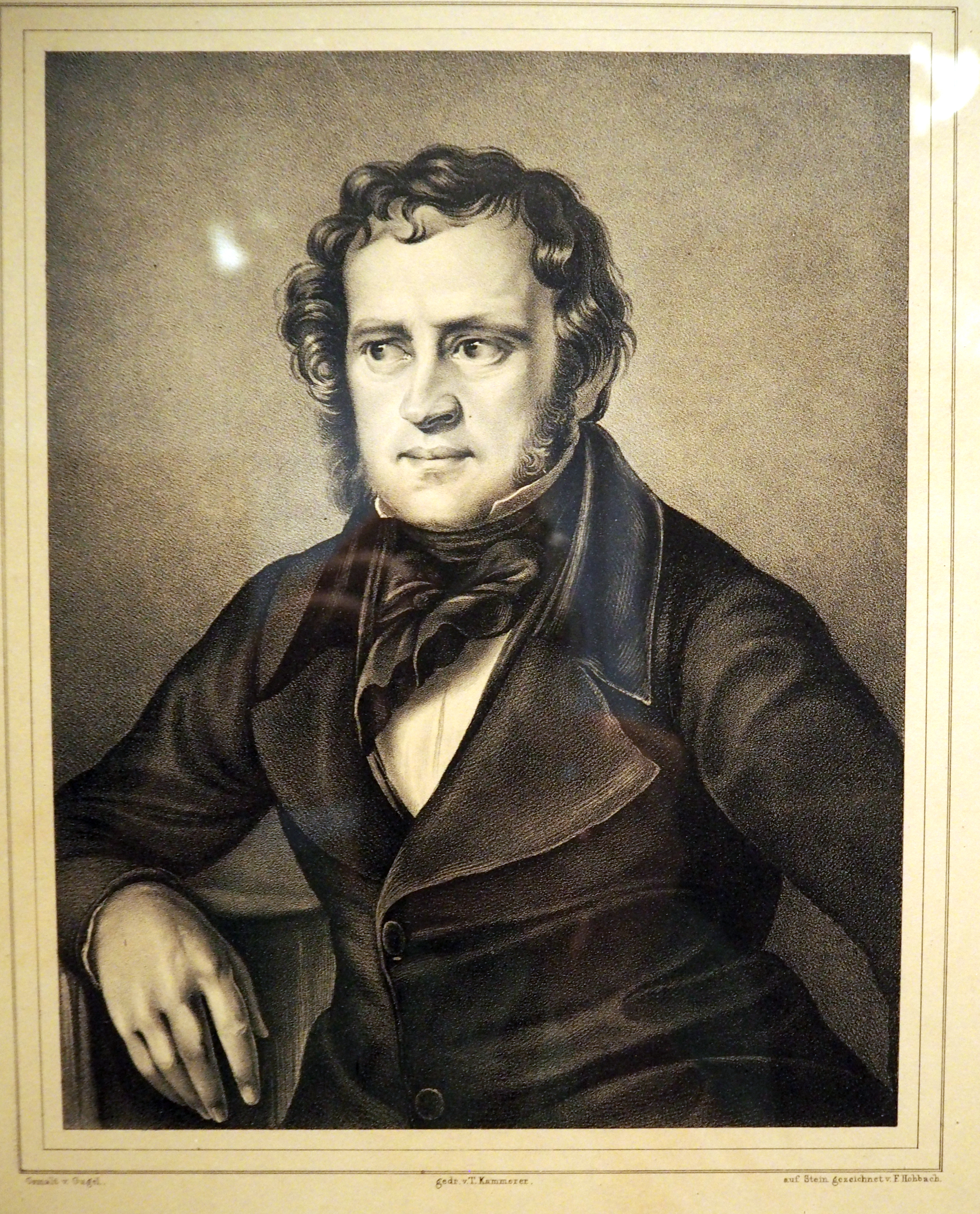 Christoph Friedrich Heinzelmann der Ältere, nach einer Litopgraphie von Friedrich Hohbach, 1869 This is a faithful photographic reproduction of a two-dimensional, public domain work of art. The work of art itself is in the public domain for the following reason: This work is in the public domain in its country of origin and other countries and areas where the copyright term is the author's life plus 100 years or less. You must also include a United States public domain tag to indicate why this work is in the public domain in the United States. This file has been identified as being free of known restrictions under copyright law, including all related and neighboring rights. The official position taken by the Wikimedia Foundation is that "faithful reproductions of two-dimensional public domain works of art are public domain". This photographic reproduction is therefore also considered to be in the public domain in the United States. In other jurisdictions, re-use of this content may be restricted; see Reuse of PD-Art photographs for details.